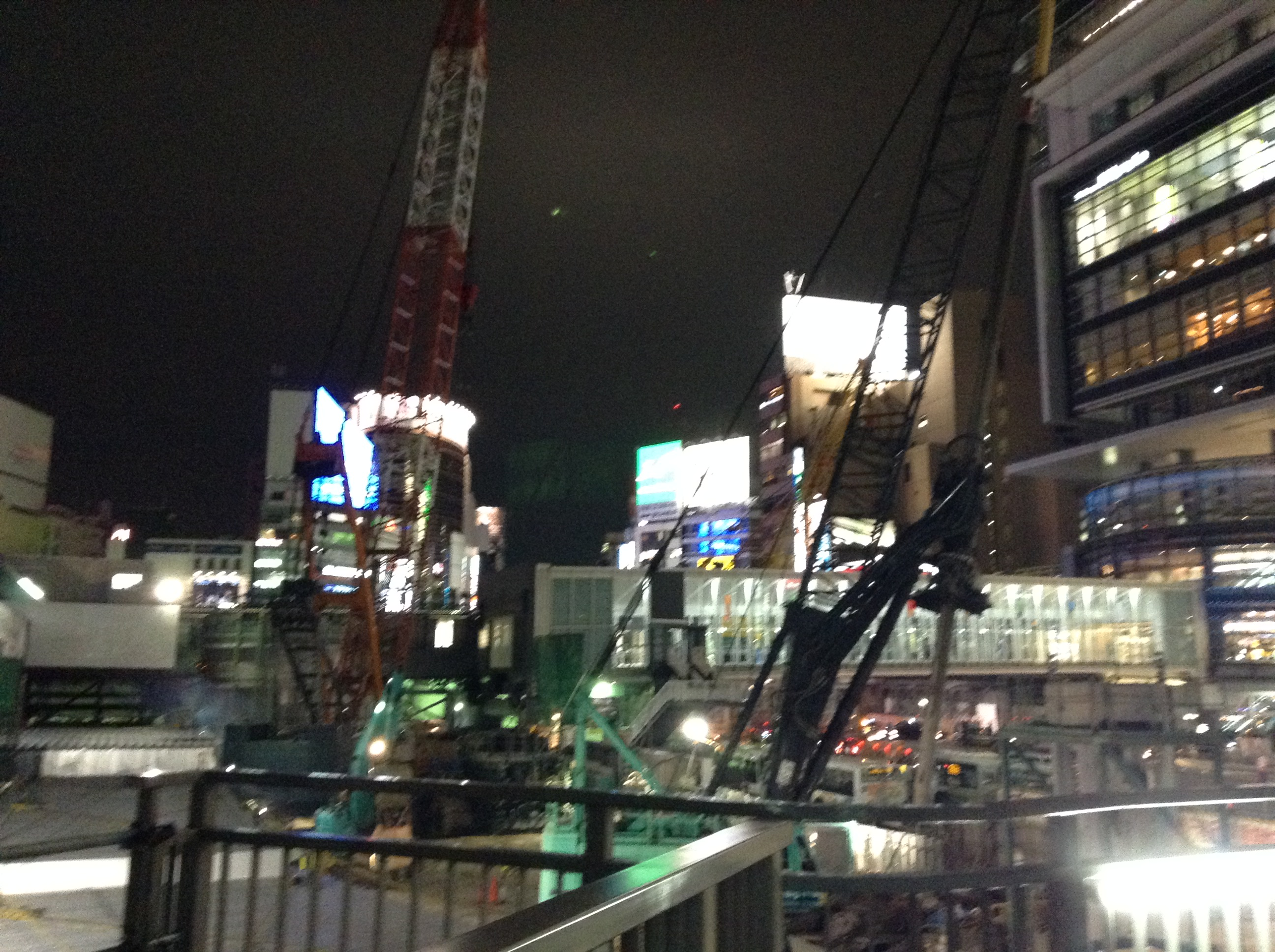 サイレントマジョリティMVの撮影の場所